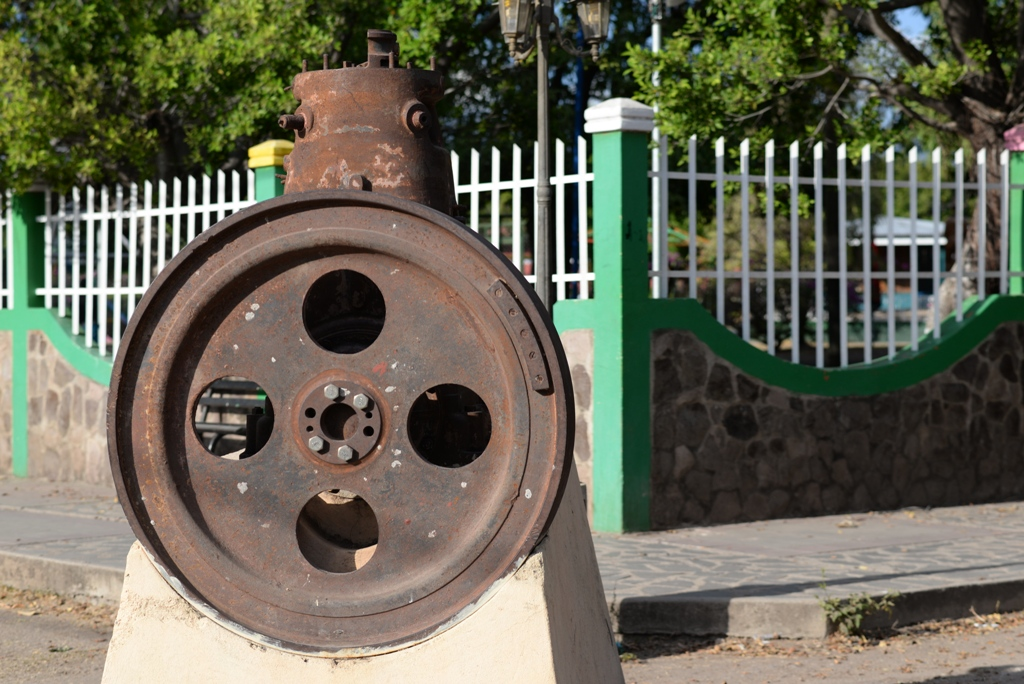 Parque Central, San Juan de Limay, Ncaragua